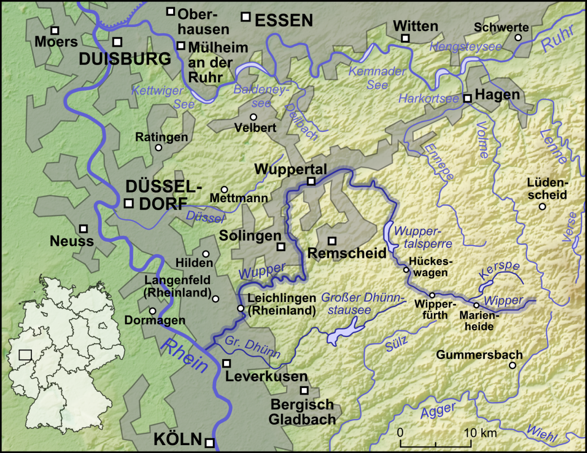 Die Wupper und ihre Nebenflüsse